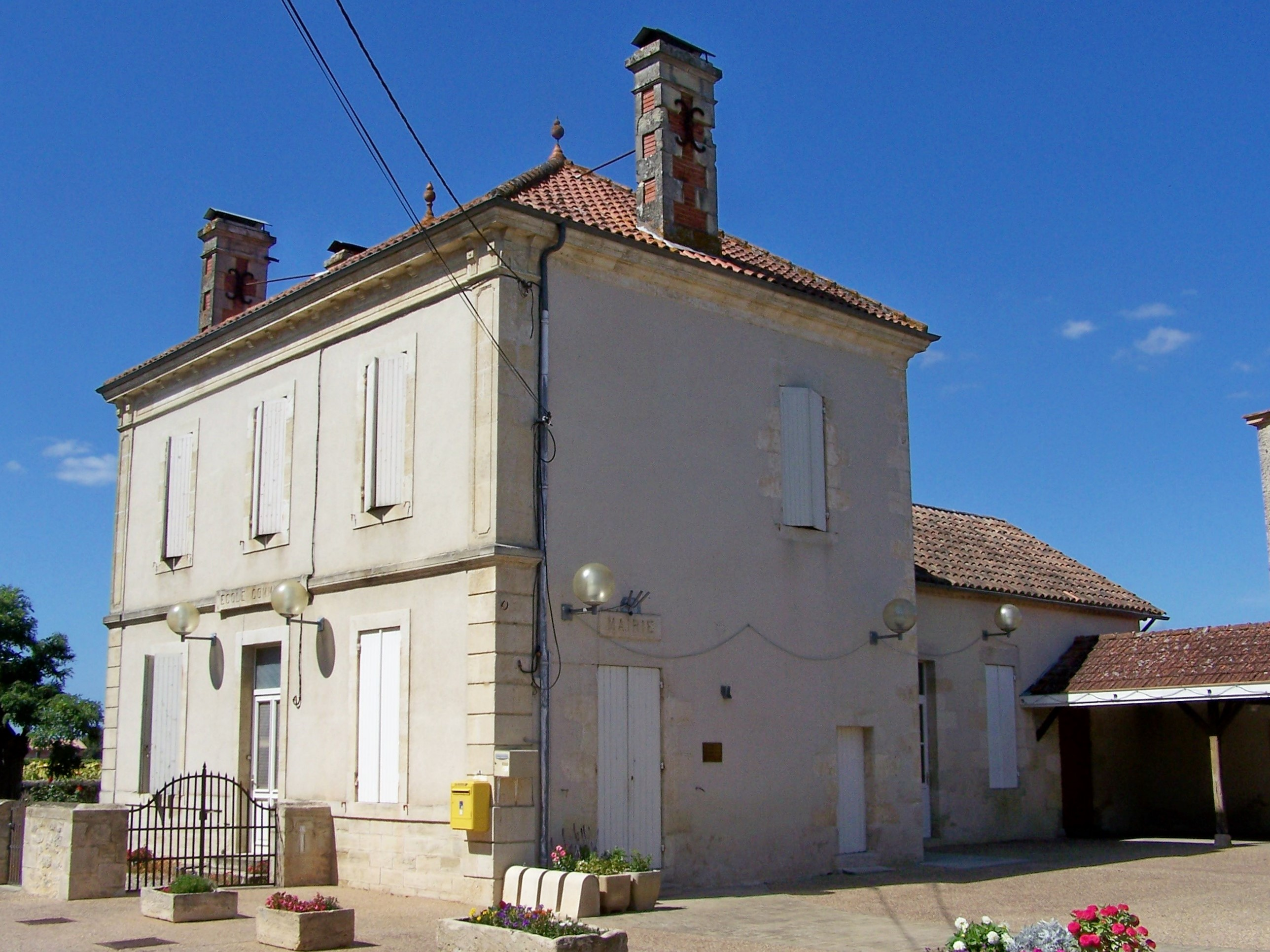 Mairie de Castillon-de-Castets, Gironde, France